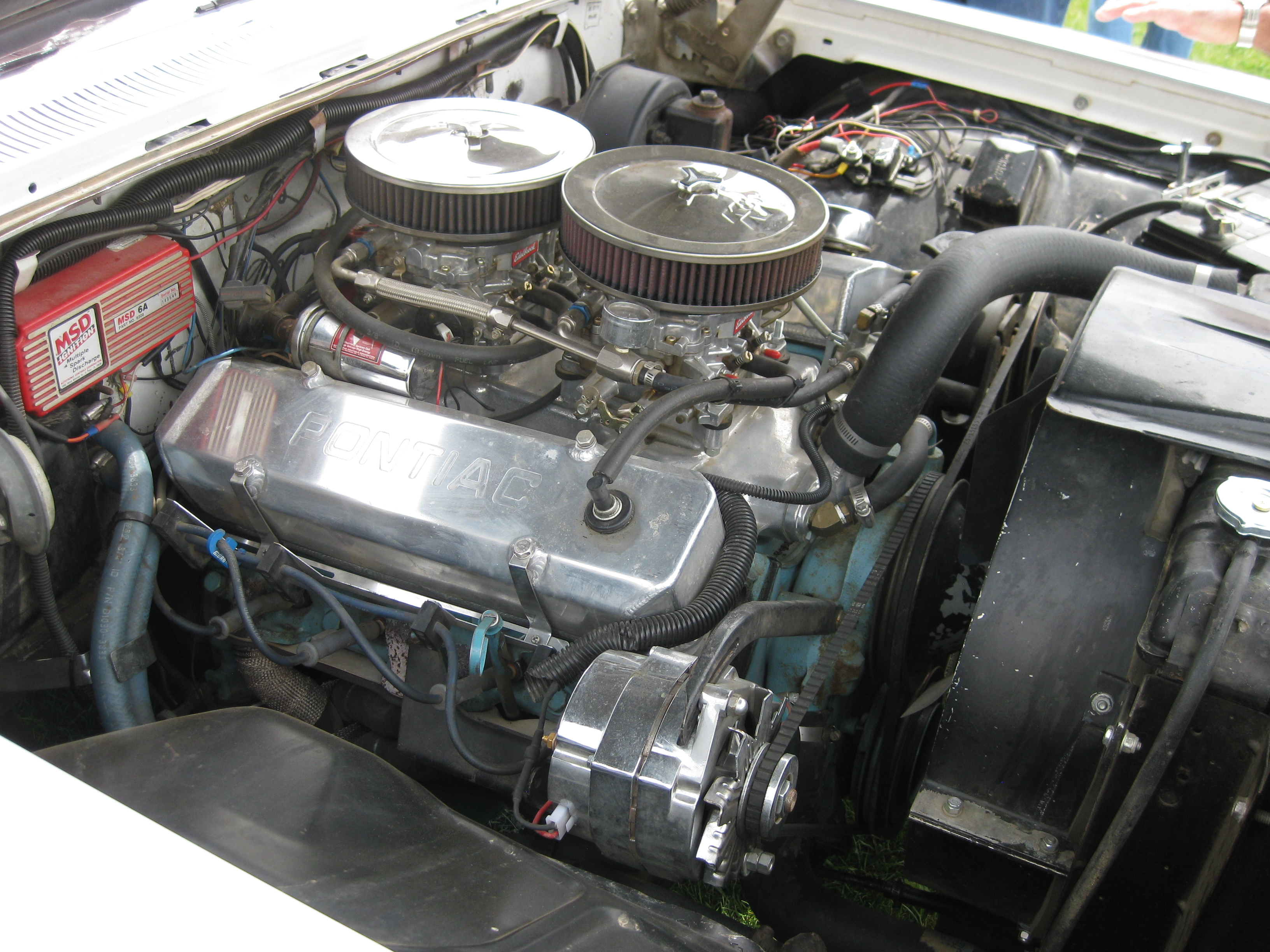 1960 Pontiac Venture engine - 389 cid V8